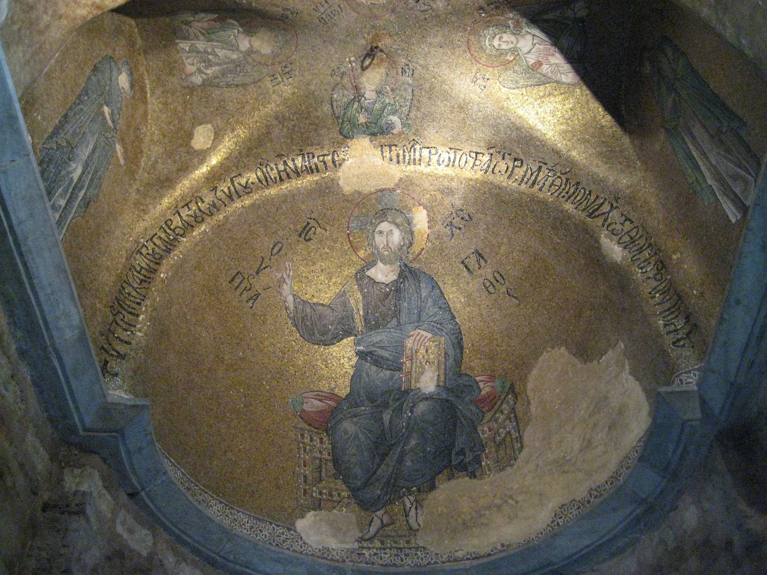 Pammakaristos Church